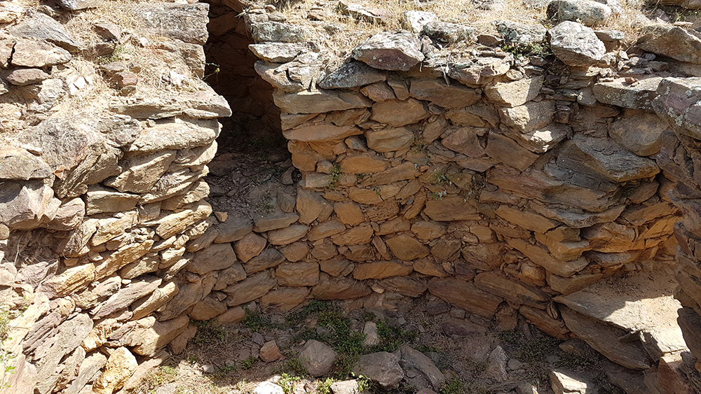 Nuraghe San Pietro